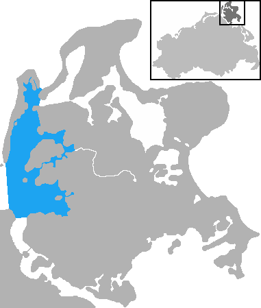 Mecklenburg-Vorpommern, Westrügener Bodden Bay (marked blue)